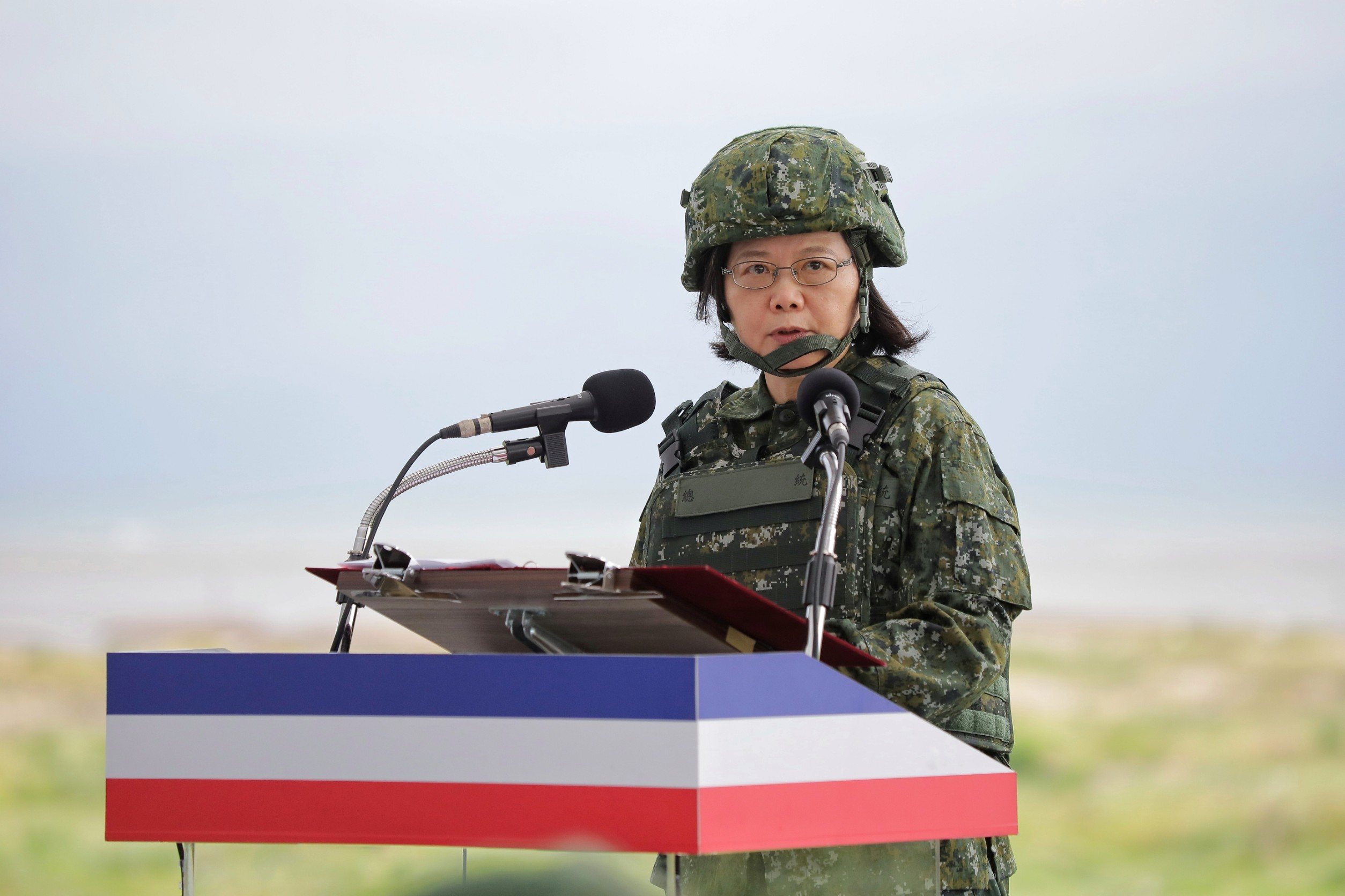 總統蔡英文視察漢光36號演習「三軍聯合反登陸作戰」操演